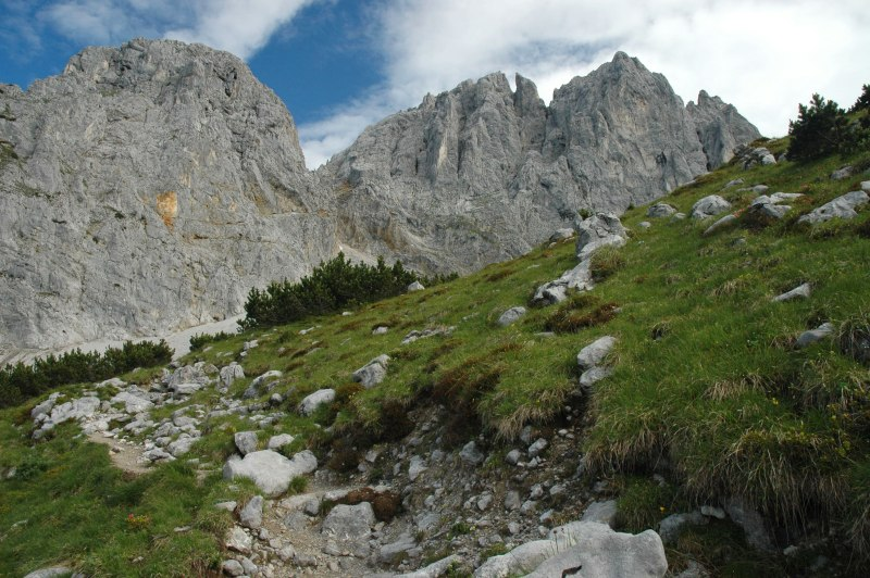 Ellmauer Halt od jihu